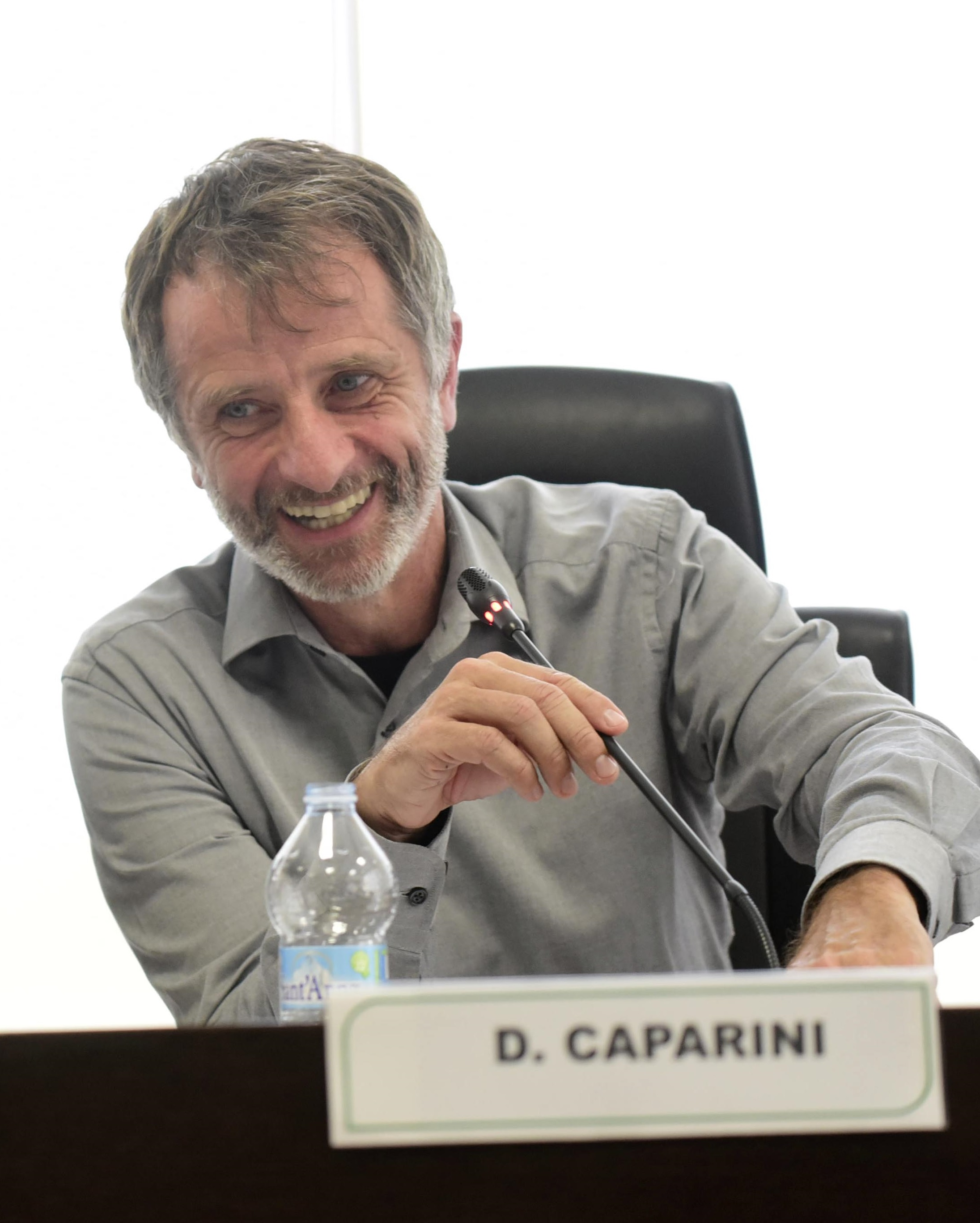 Davide Caparini durante un incontro in Regione Lombardia